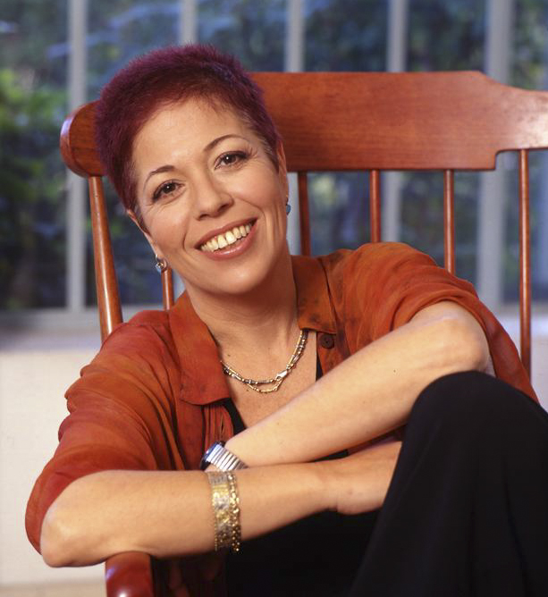 צילום איציק שוקל